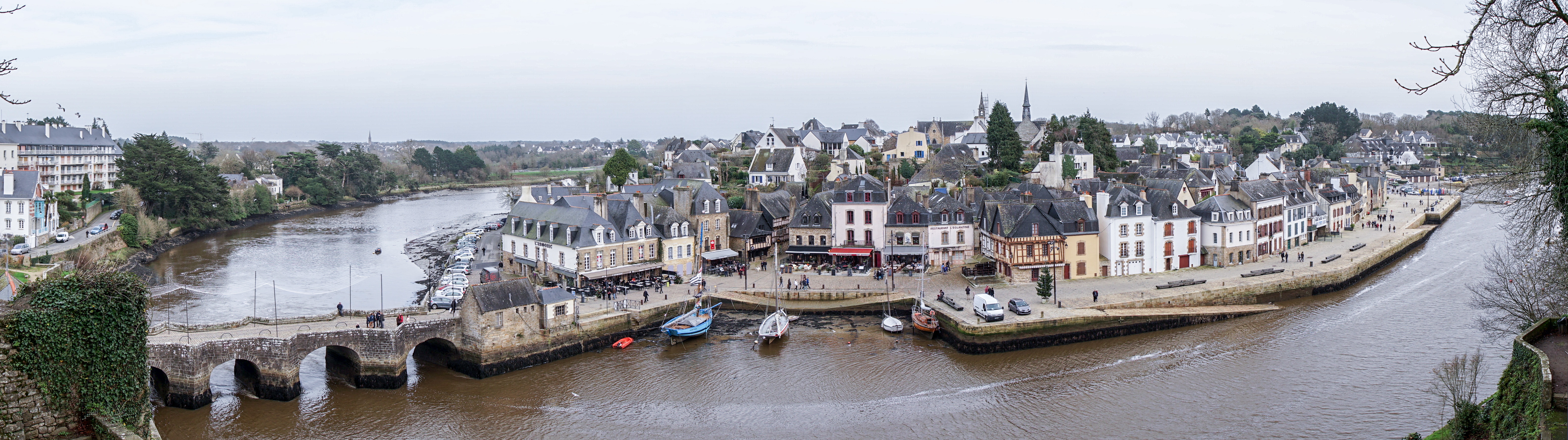 Panoramique de la vieille ville